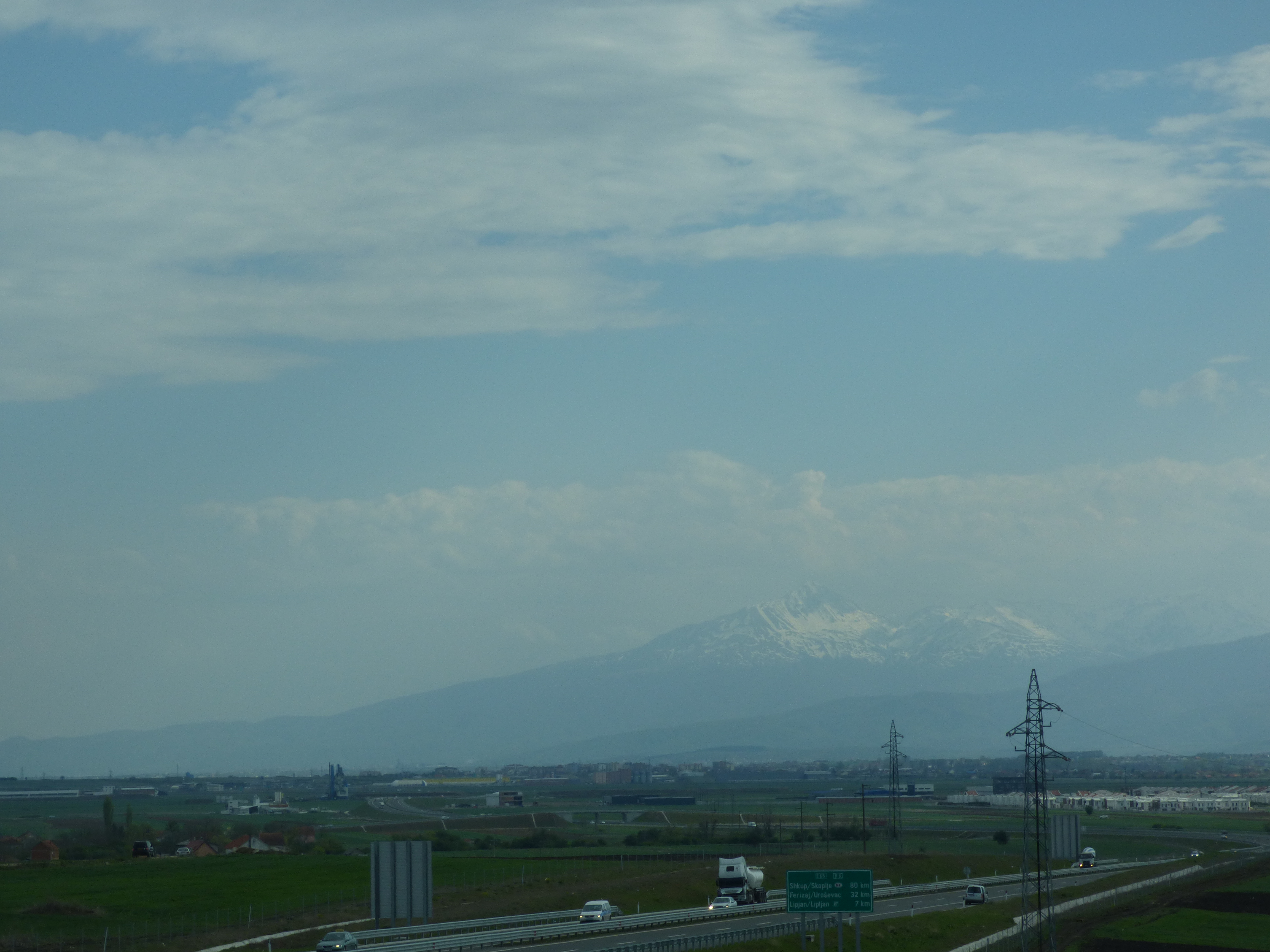 Autostrada Arben Xhaferi (R 6) Kosovo